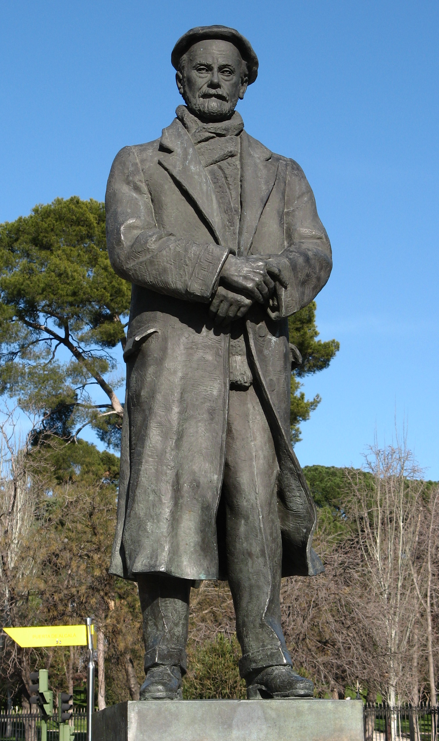 MADRID A PIO BAROJA 17 MARZO 1980 Escultura de Pío Baroja Custa de Moyano Madrid Comunidad de Madrid España